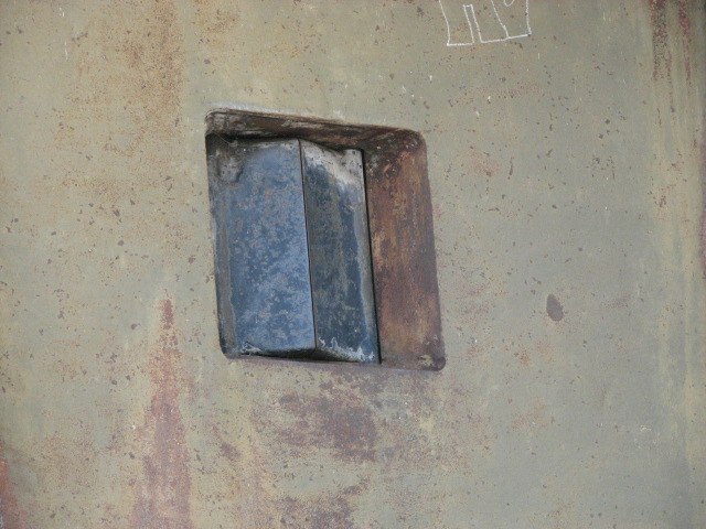 Volet blindé d'un bloc d'action frontale de 75 de l'ouvrage Maginot de Rimplas (Alpes-Maritimes).